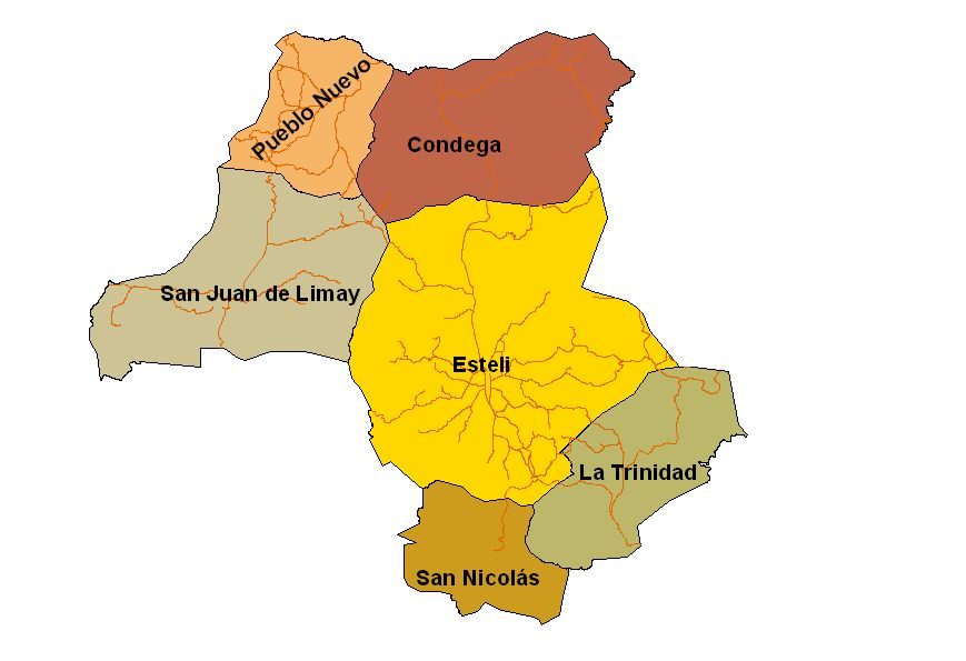 Caminos del Departamento de Estelí